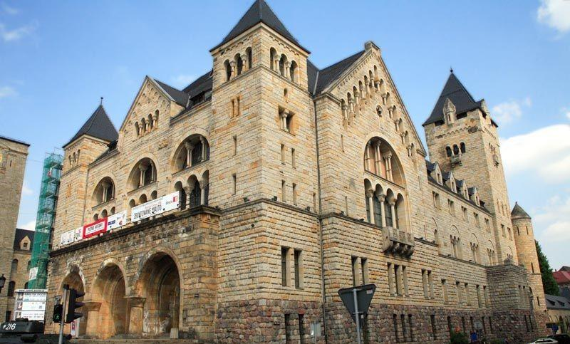 Polska